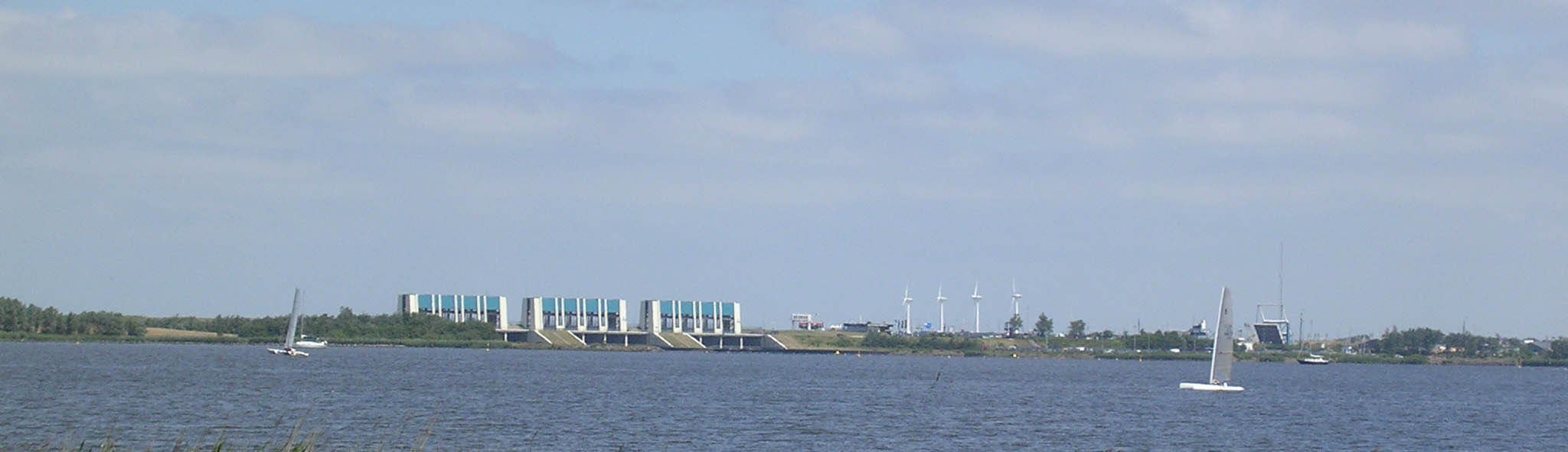 Spuuszielen bie t Laauwermeer. Nedersaksies: Spuuszielen bie t Laauwersmeer.